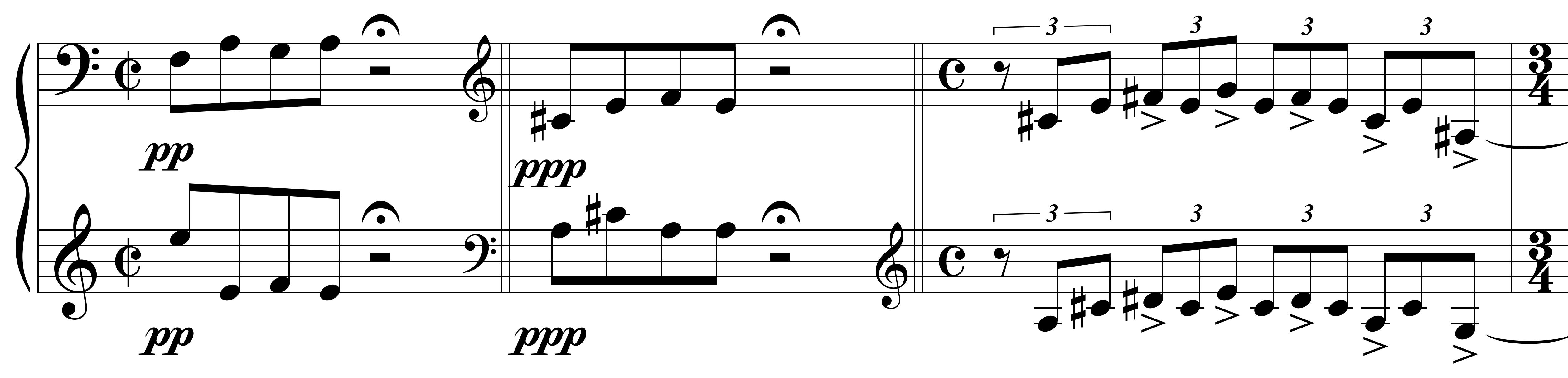 Extrait de la pièce XXIV d'Anna Livia Plurabelle d'André Hodeir